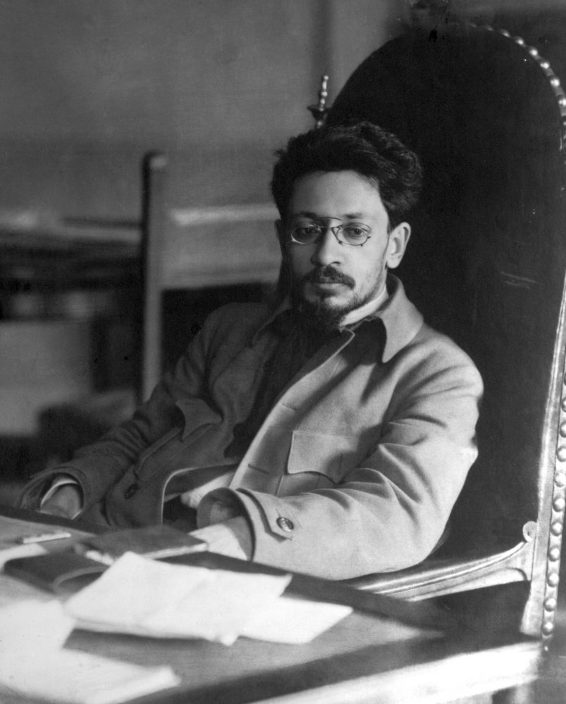 Свердлов Яков Михайлович (1885—1919)